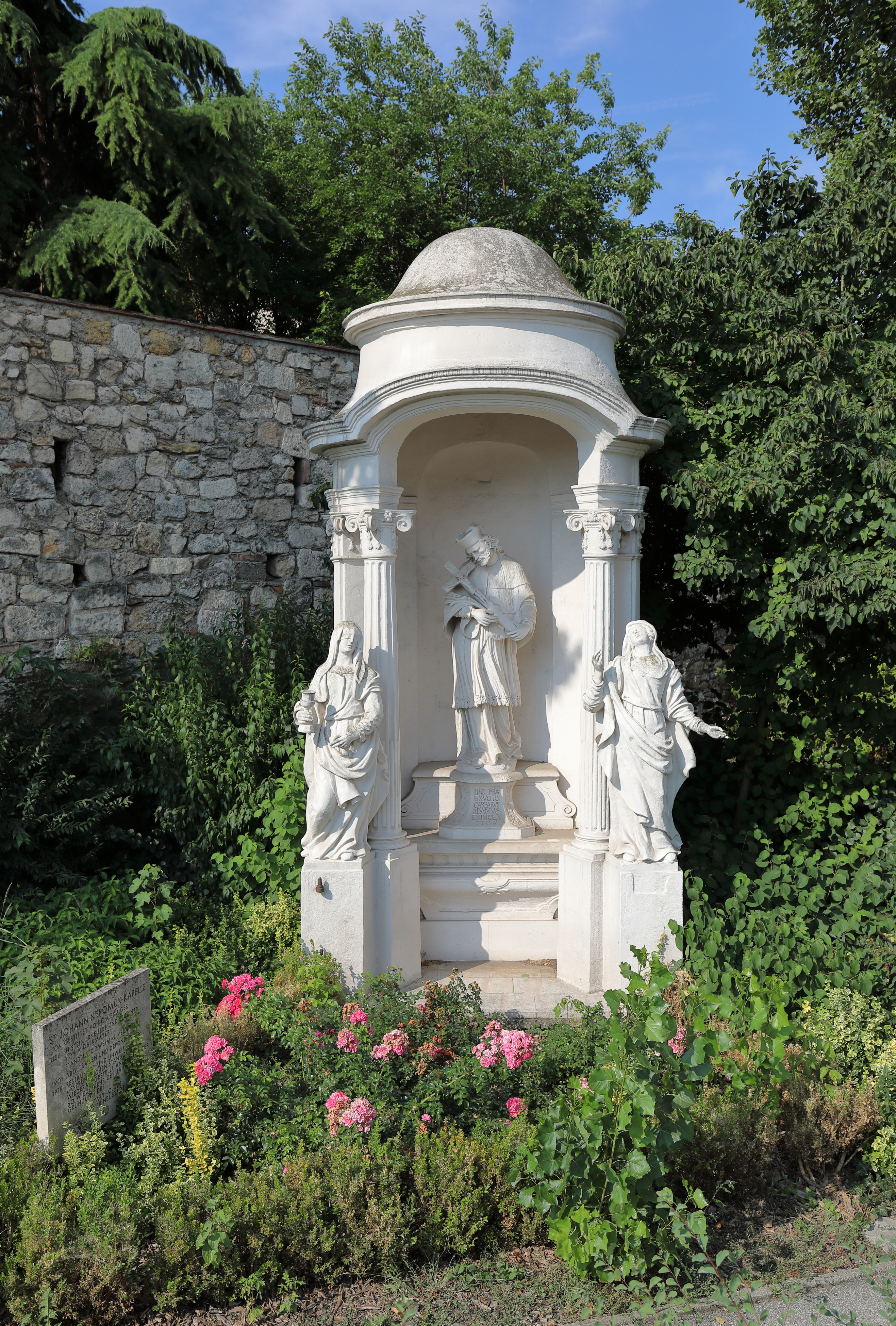 Der Nepomuk-Kapellenbildstock am Johann-von-Nepomuk-Platz (westseitig) in der niederösterreichischen Stadtgemeinde Wiener Neustadt.Der Kapellenbildstock wurde 1704 von Caspar Adam Exinger gestiftet und schon 1756 durch Anton Obermayer erneuert und ergänzt. Nach zweimaliger Standortveränderung 1901 abgetragen und eingelagert, wurde er 1979 nahe dem ursprünglichen Standort wieder aufgestellt.